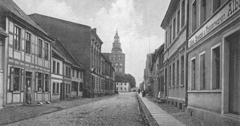 Budynki przy ówczesnej Marienstraße w Greifenberg/Pommern - dziś ul. Niepodległości w Gryficach (Polska)